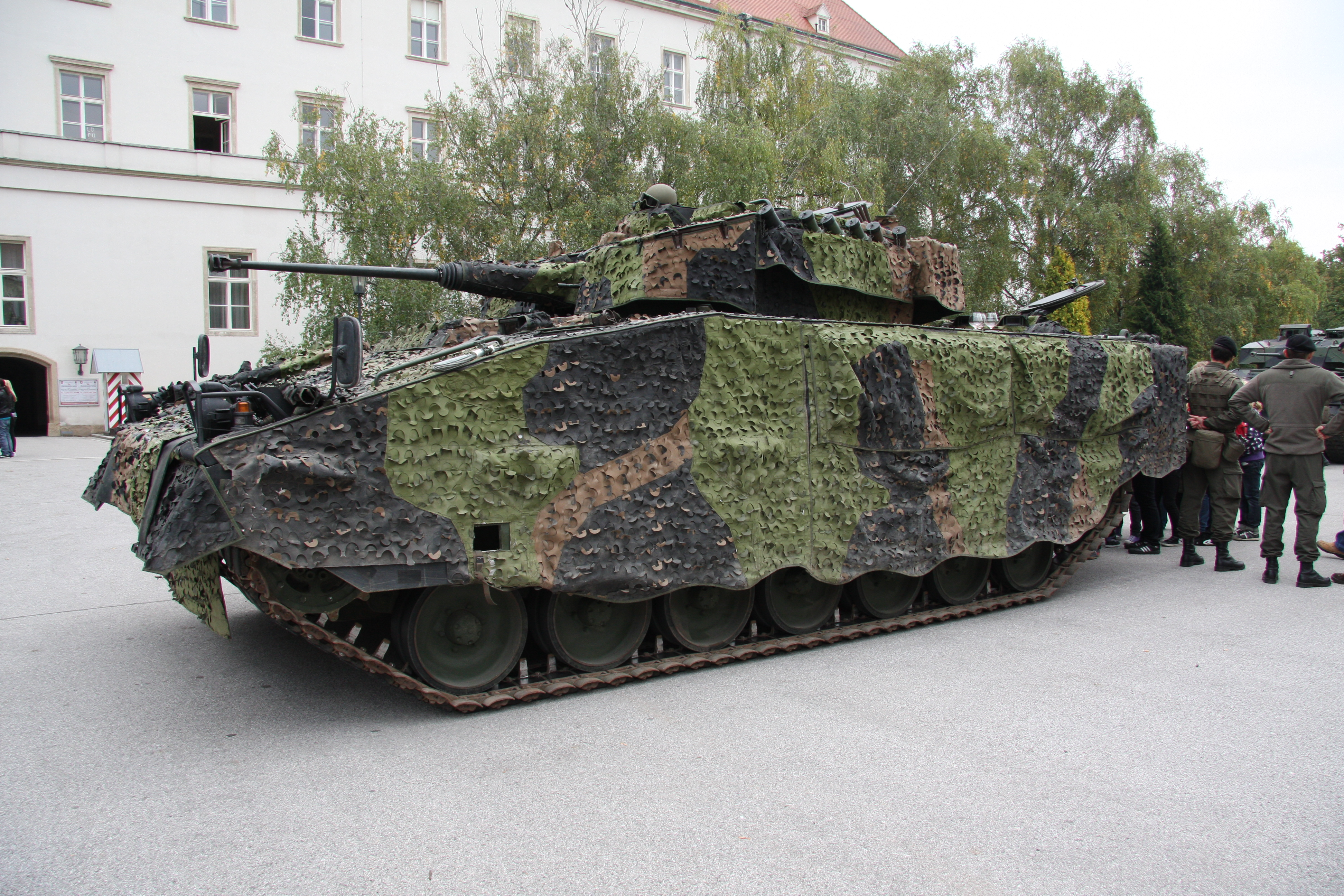 (c) - Dieser Schützenpanzer Ulan mit Mobile Camouflage System (MCS) von Habernig Camouflage nahm an der Parade zur Ausmusterung der Leutnante 2010 teil.